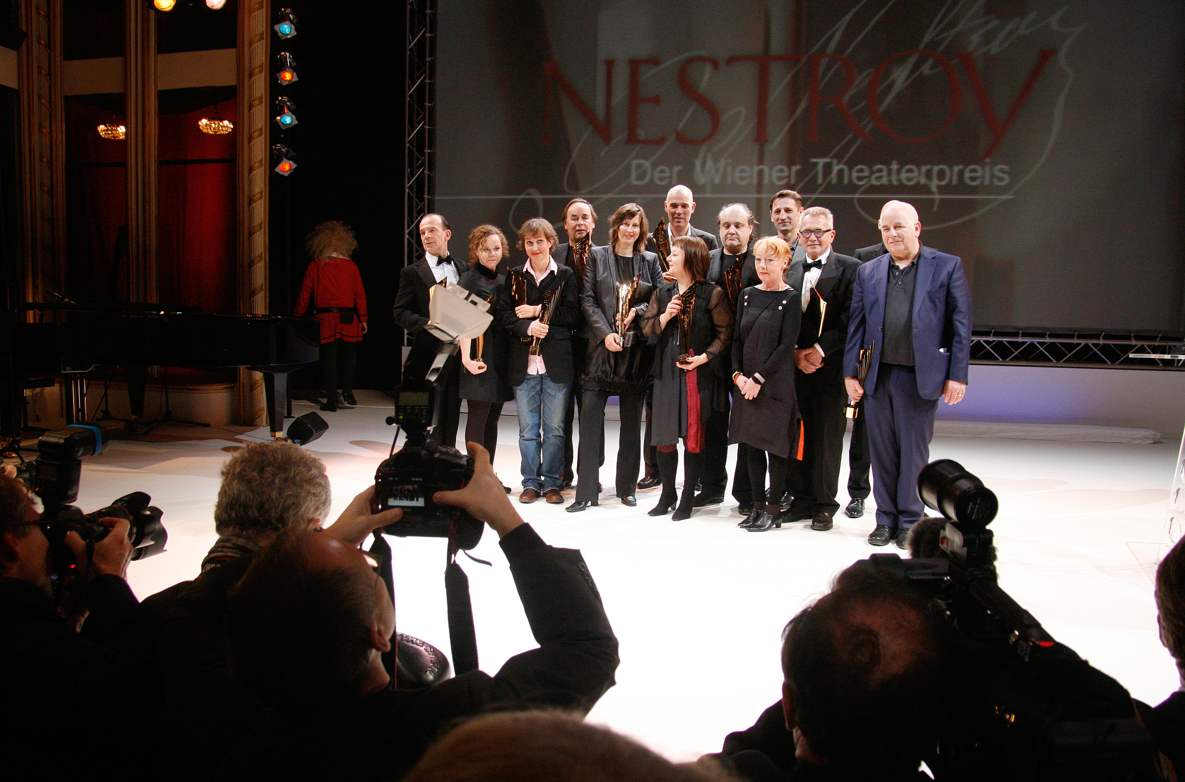 Martin Wuttke (Schauspieler), Sarah Viktoria Frick (Nachwuchs), Barbara Frey (Schauspielhaus Zürich, bestes Aufführung), Johann Adam Oest (Nebenrolle), Kathrin Röggla (Autorenpreis), Matthias Hartmann (Spezialpreis), Sabine Mitterecker (Theater.punkt, beste Off-Produktion), Paulus Manker (Publikumspreis), Ulrike Kaufmann (Lebenswerk), Andreas Patton (Theater.punkt, beste Off-Produktion), Erwin Piplits (Lebenswerk), Alvis Hermanis (verdeckt, Regie) und Johannes Schütz (Ausstattung) bei der Verleihung des Nestroy-Theaterpreises 2010 im Burgtheater in Wien.